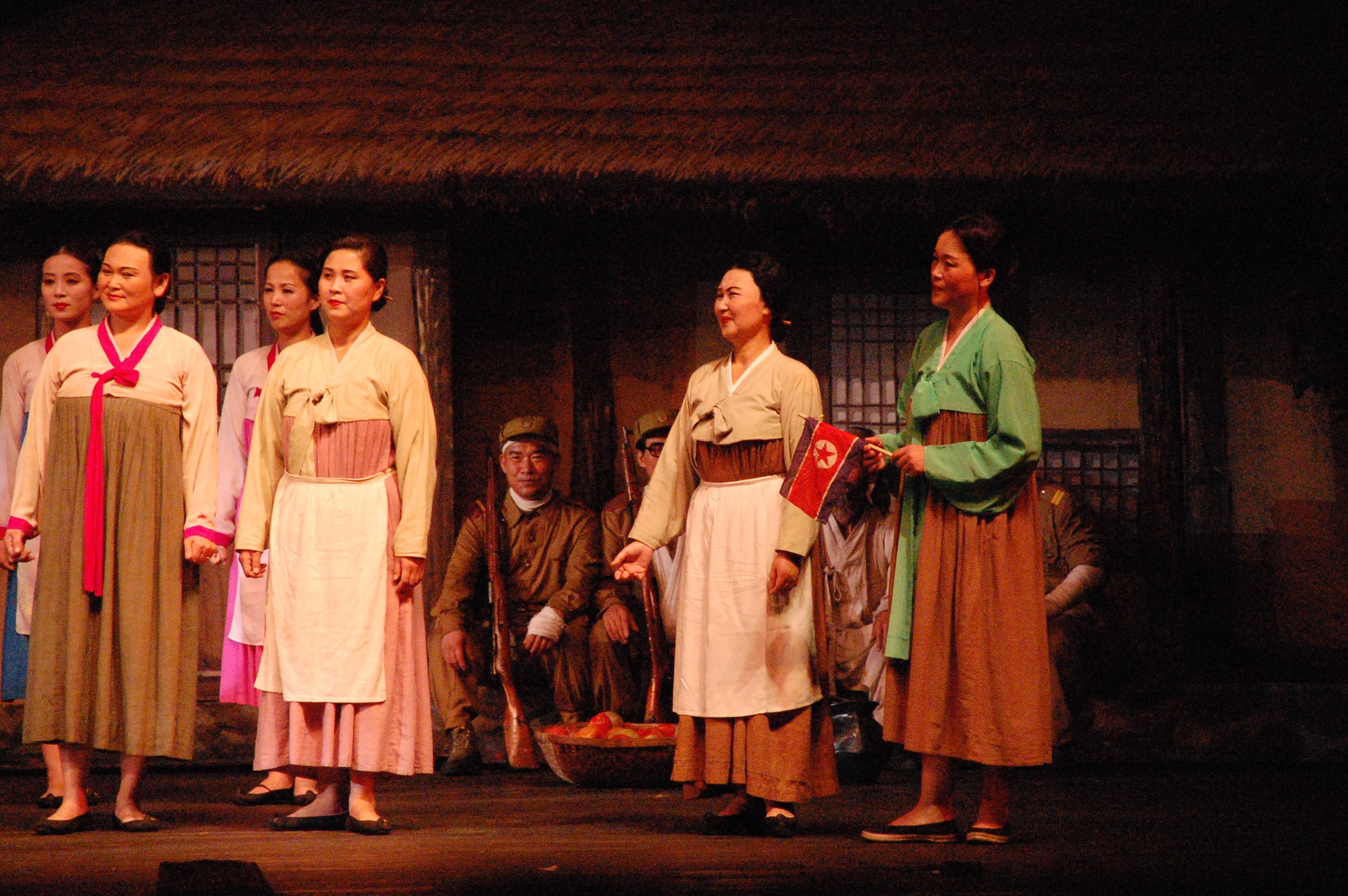 North Korea — Pyongyang Opera